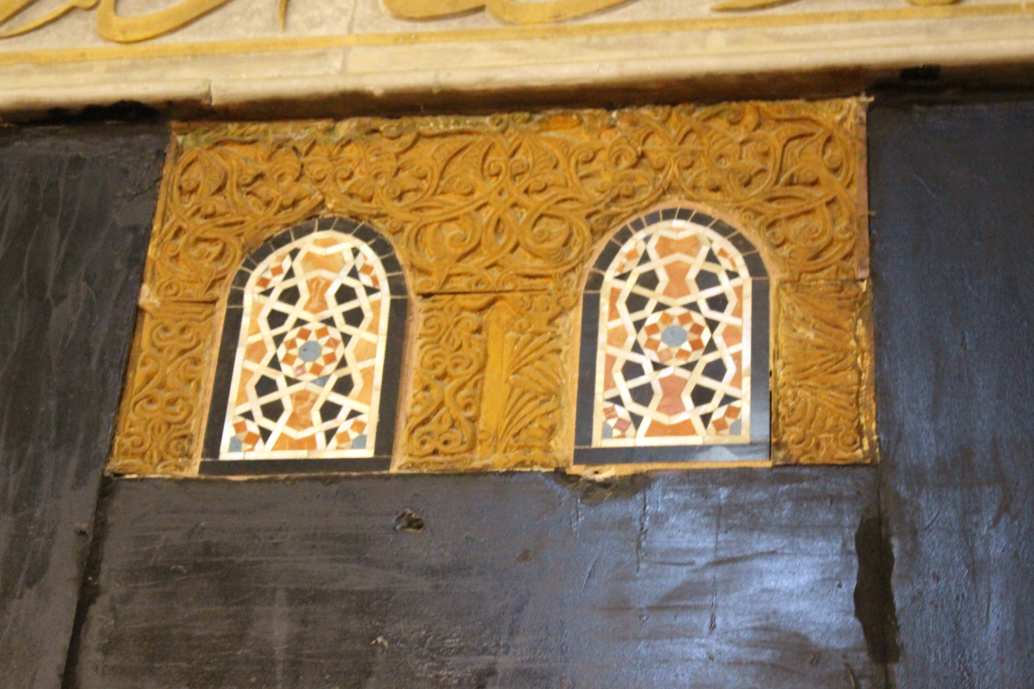 نافذتان تُطلان على مُصلى المالكية من المصلى الإبراهيمي